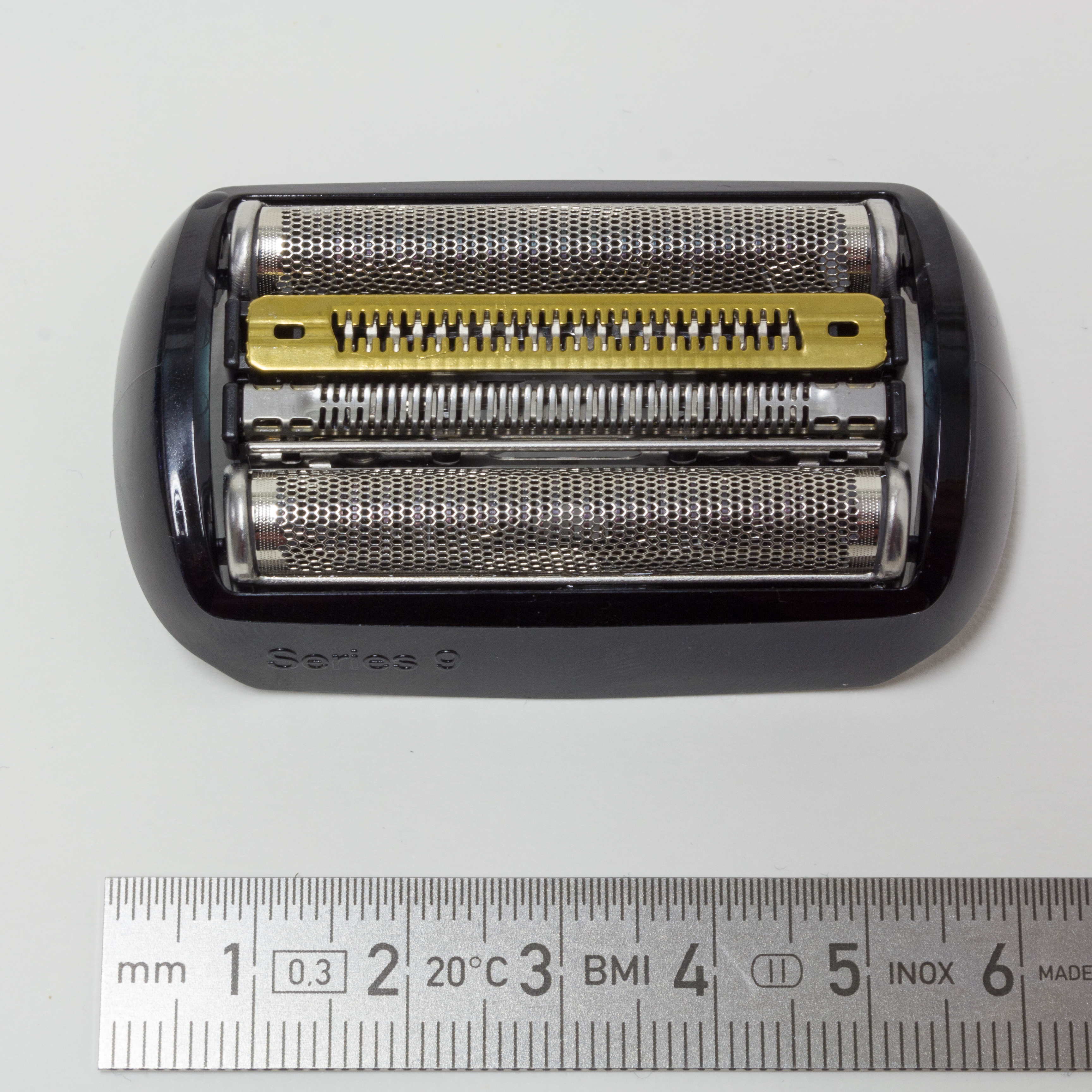 Draufsicht Scherkopf Braun Series 9